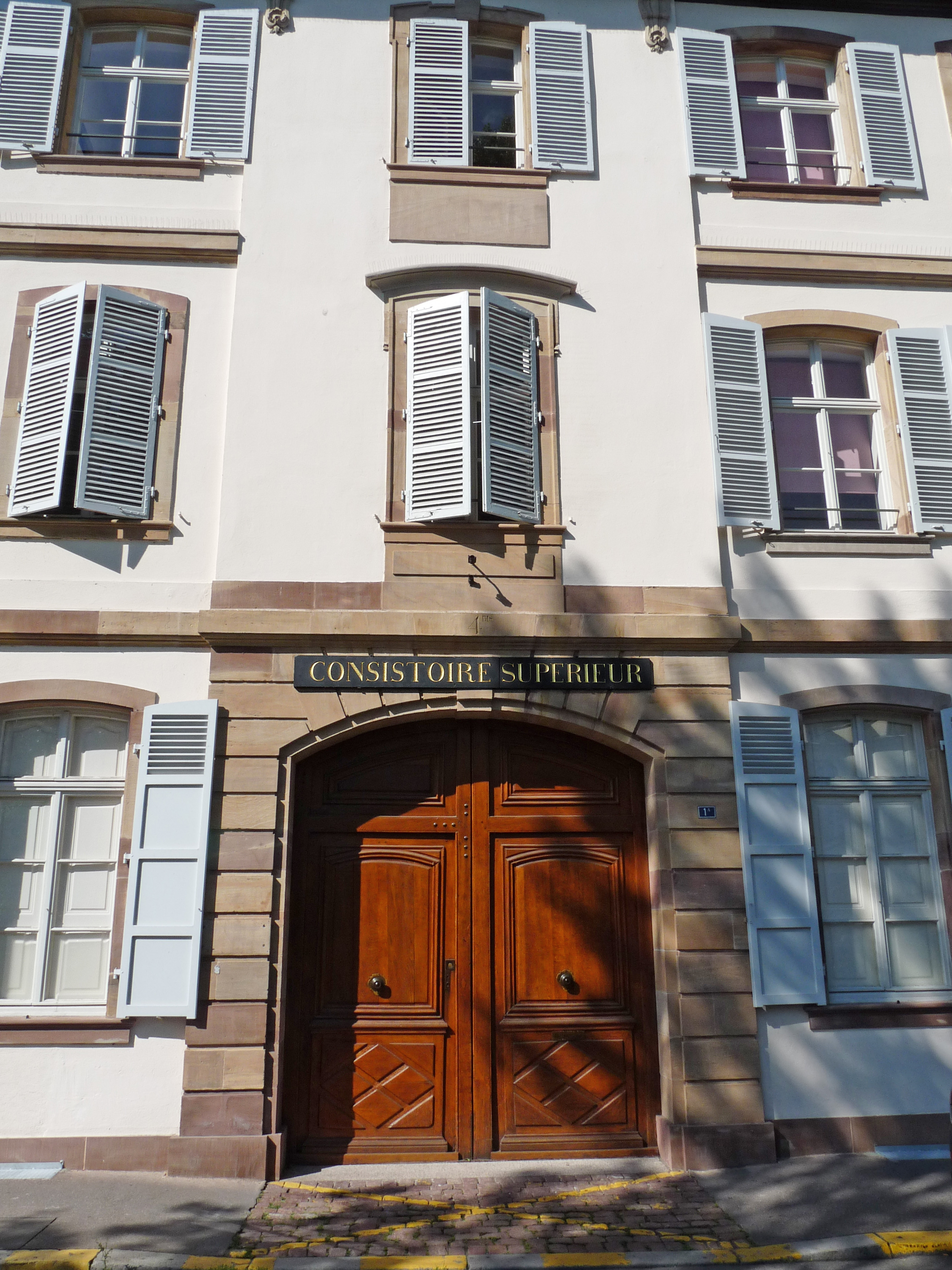 Strasbourg : Consistoire supérieur de l'Eglise de la Confession d'Augsbourg d'Alsace et de Lorraine. 1b quai Saint-Thomas.